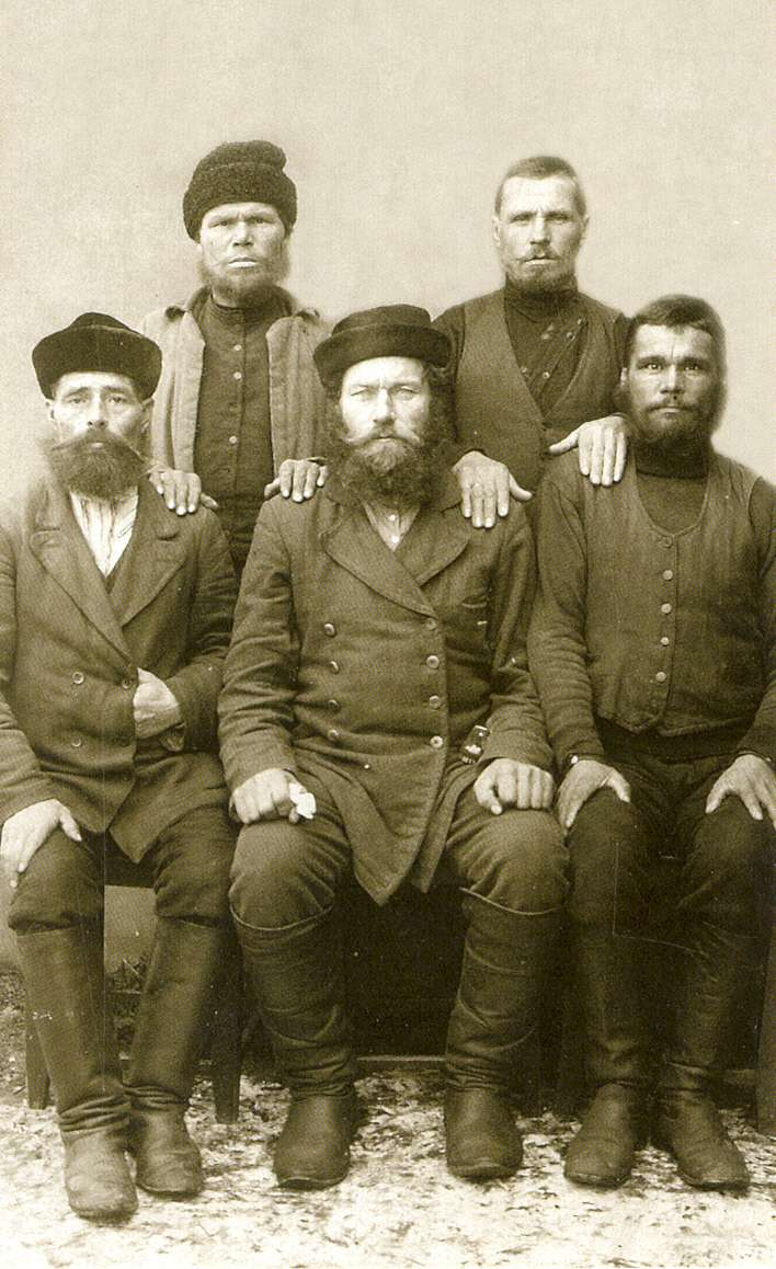 Помори, дореволюційна фотографія